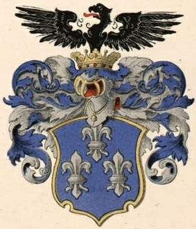 Kieteri suguvõsa aadlivapp